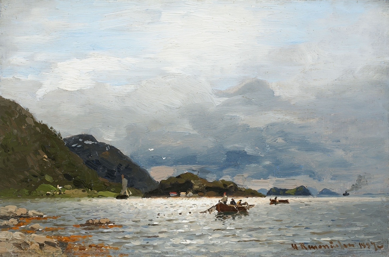 Küstenlandschaft.